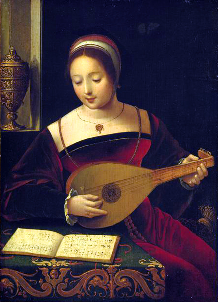 Eine vornehm gekleidete junge Frau spielt auf einer Laute. Sie trägt ein rotes, Kleid aus Samt und auf dem Kopf eine Haube, einen goldenen Ring am Finger ihrer rechten Hand und eine filigrane Kette mit einem aufwändig gearbeiteten, mit Perlen und Rubinen besetzten Anhänger. Die Dame blickt auf ein aufgeschlagenes Liedheft auf dem Tisch vor ihr, der mit einem ornamentierten Teppich bedeckt ist. Der Text der Strophe ist lesbar: „Si j’ayme mon amy / trop, plus que mon mary / Se n’est pas de mervelles“ (wenn ich meinen Freund mehr liebe als meinen Ehemann, so wundert dies niemanden). Das Gedicht stammt von Clément Marot (1495?–1544) und wurde 1529 veröffentlicht, die Melodie wurde von Claudin de Sermisy (um 1490–1562) komponiert. Die anmutige, tugendhafte Darstellung der gebildeten Lautenspielerin steht in Kontrast zum eindeutigen Hinweis auf Ehebruch. Das kostbare Gefäßes in der Nische links wird sowohl als Salbgefäß der Maria Magdalena gedeutet als auch als rein dekoratives Element im Bild. (n. Sandra Pisot)